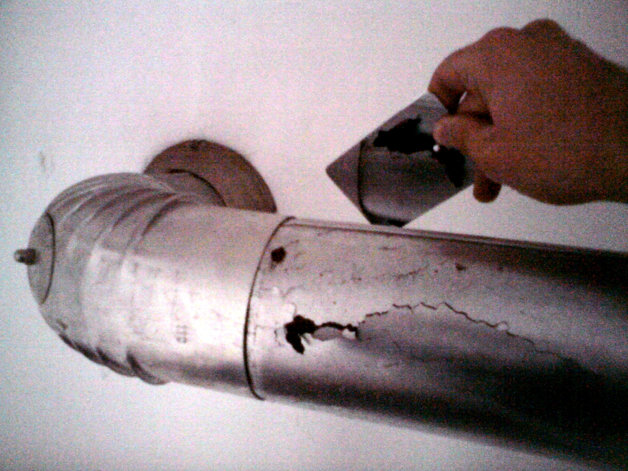 Defektes Abgasrohr einer Gasheizung. Dank an Schornsteinfegermeister & Eigentümer / Mangel wurde nach Feststellung durch Schornsteinfeger umgehend behoben.